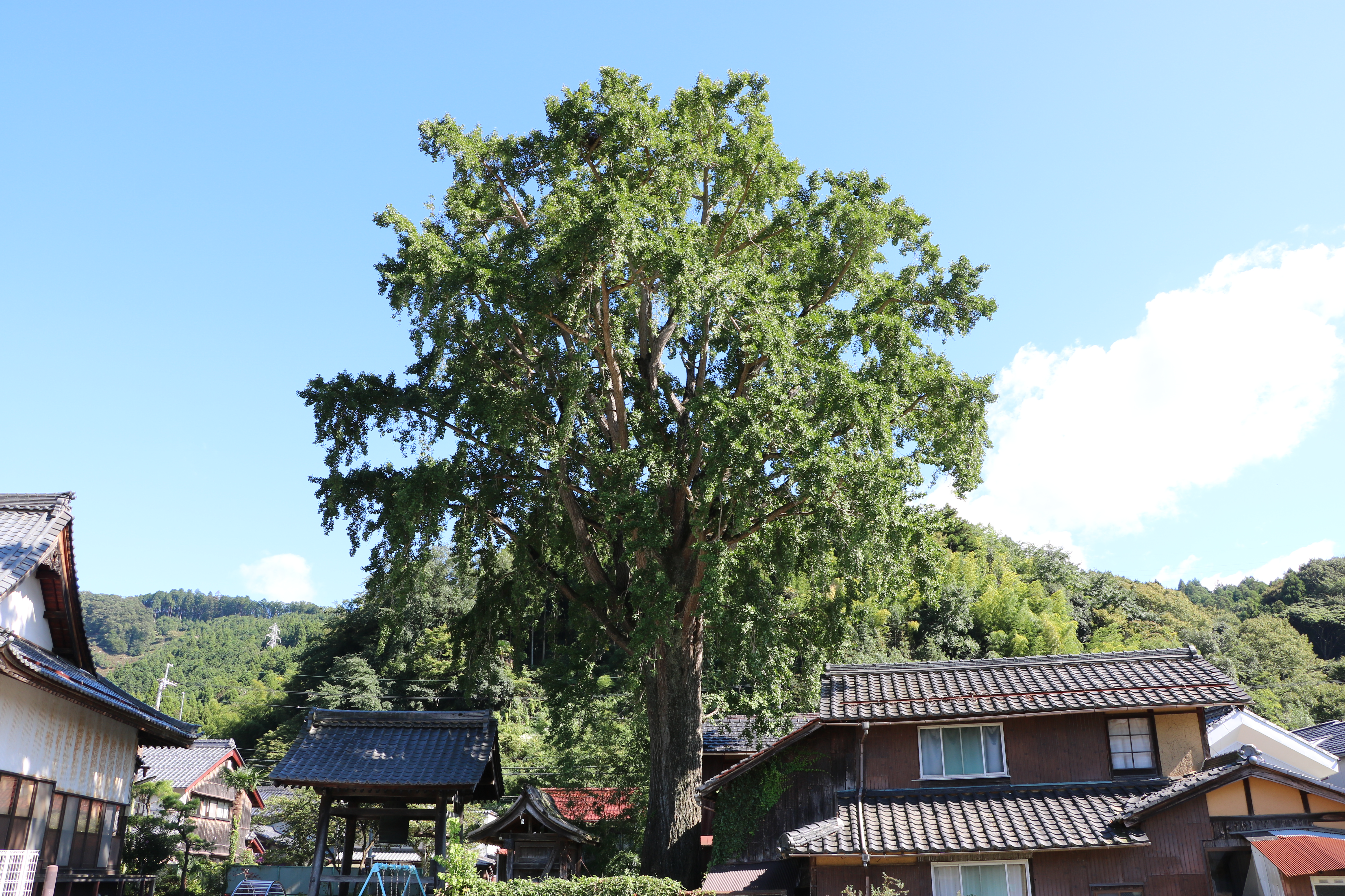 了徳寺のオハツキイチョウ（国指定天然記念物、滋賀県米原市）